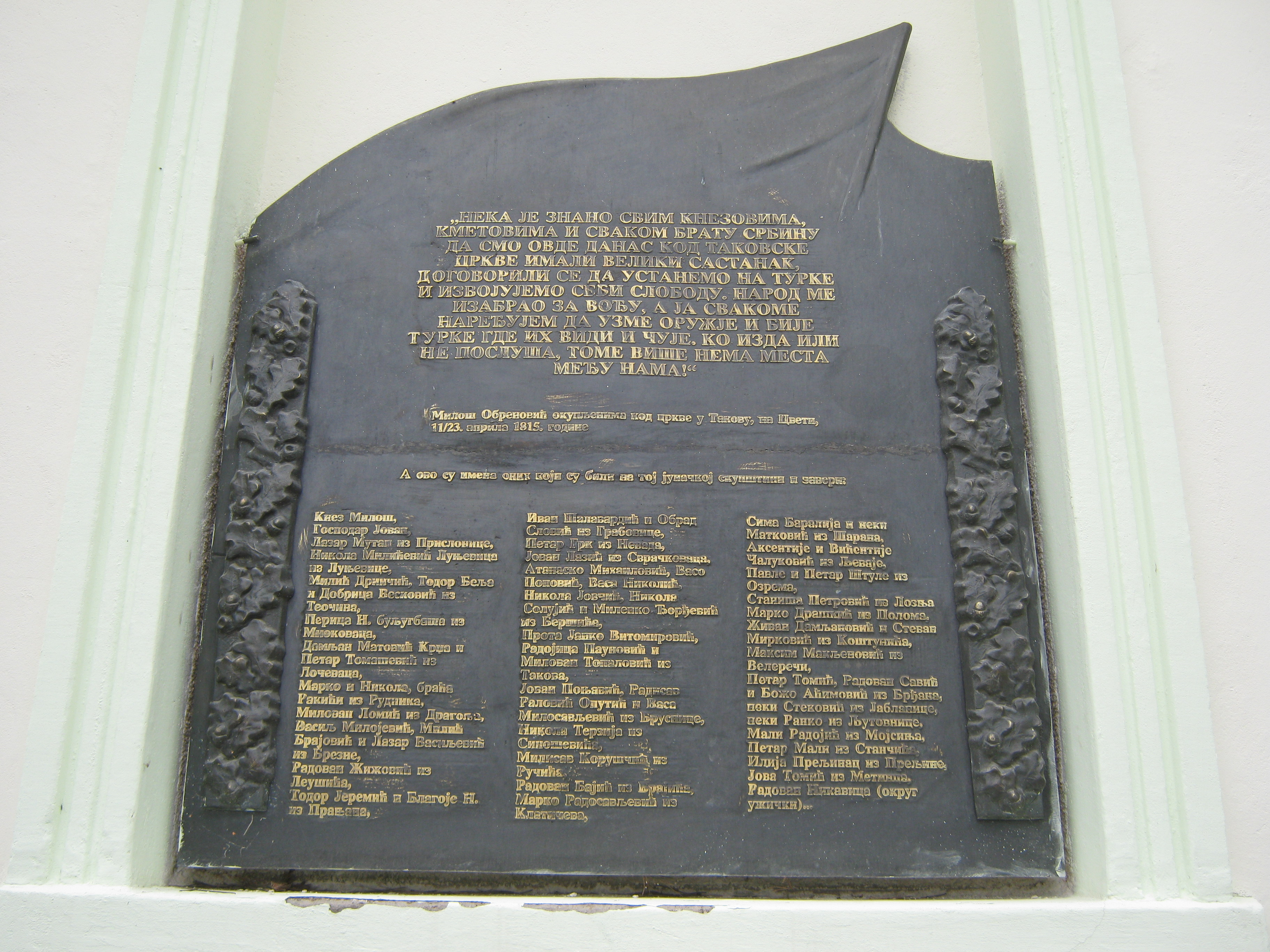 Музеј Другог српског устанка се налази у Такову и послује као део Музеја Рудничко-таковског краја. Музеј је смештен у згради старе таковске школе. У згради је смештена изложба предмета и докумената из Другог српског устанка.